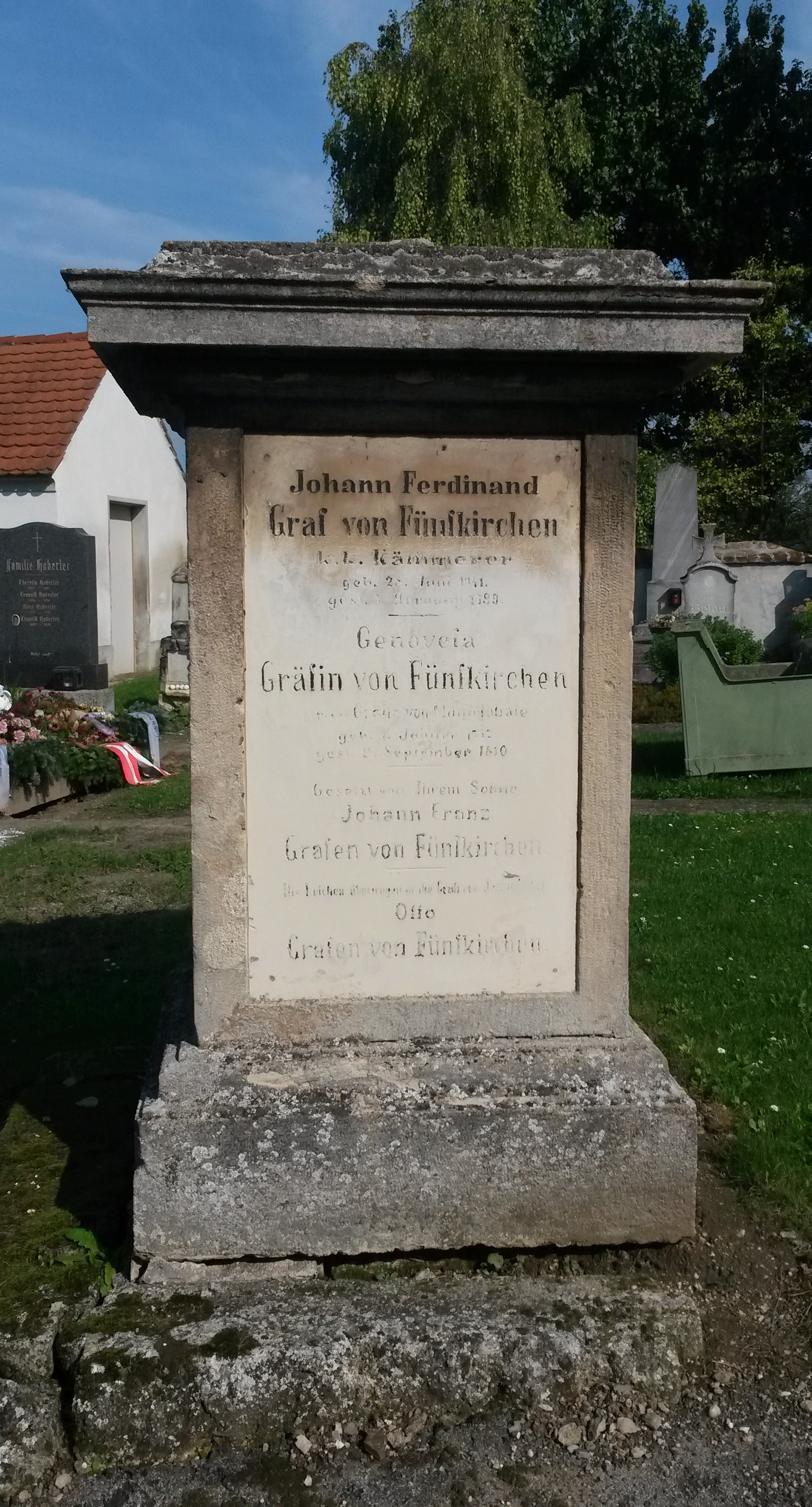 Sockel des Gedenkkreuzes am Friedhof Stützenhofen